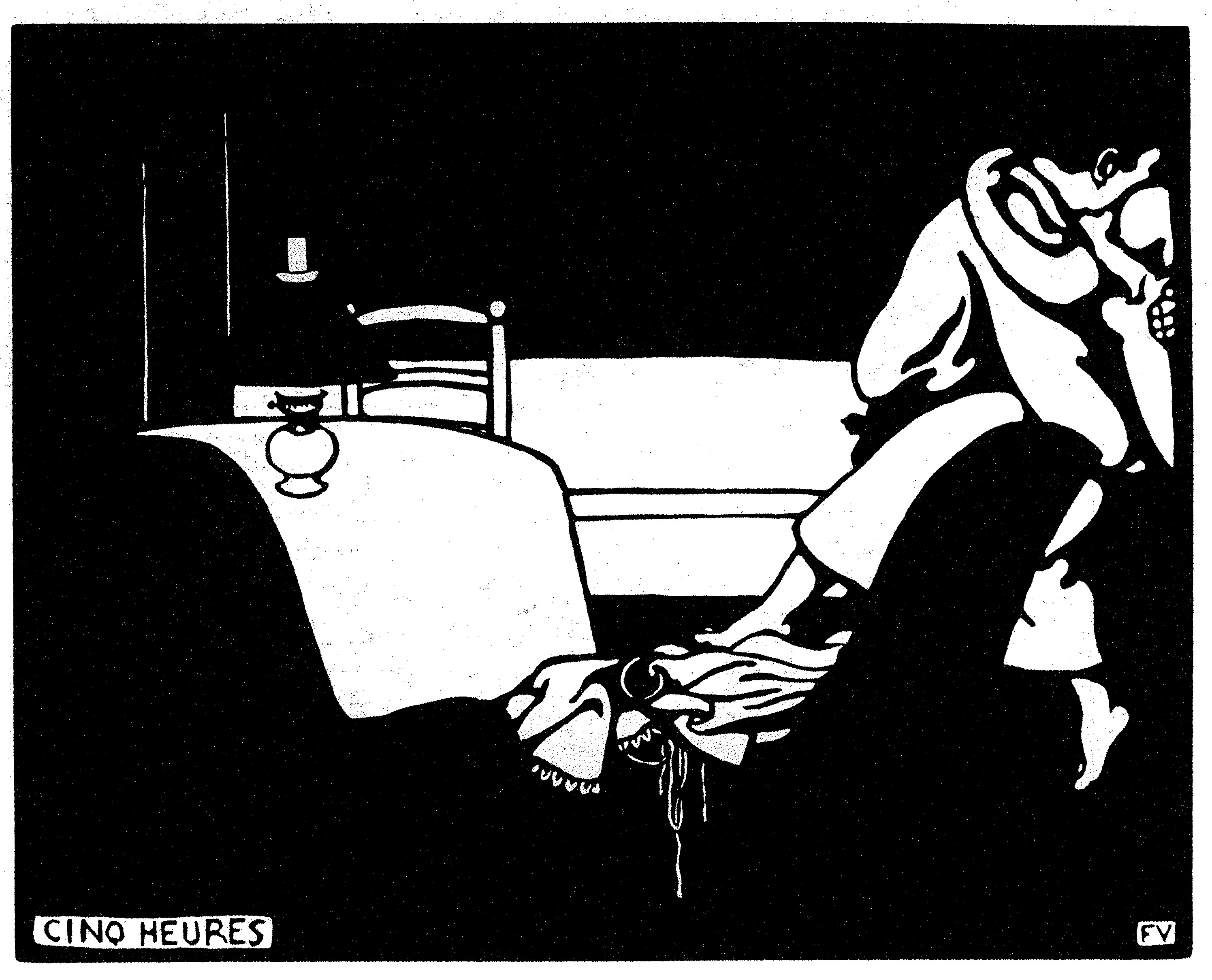 Cinq heures Intimités VII